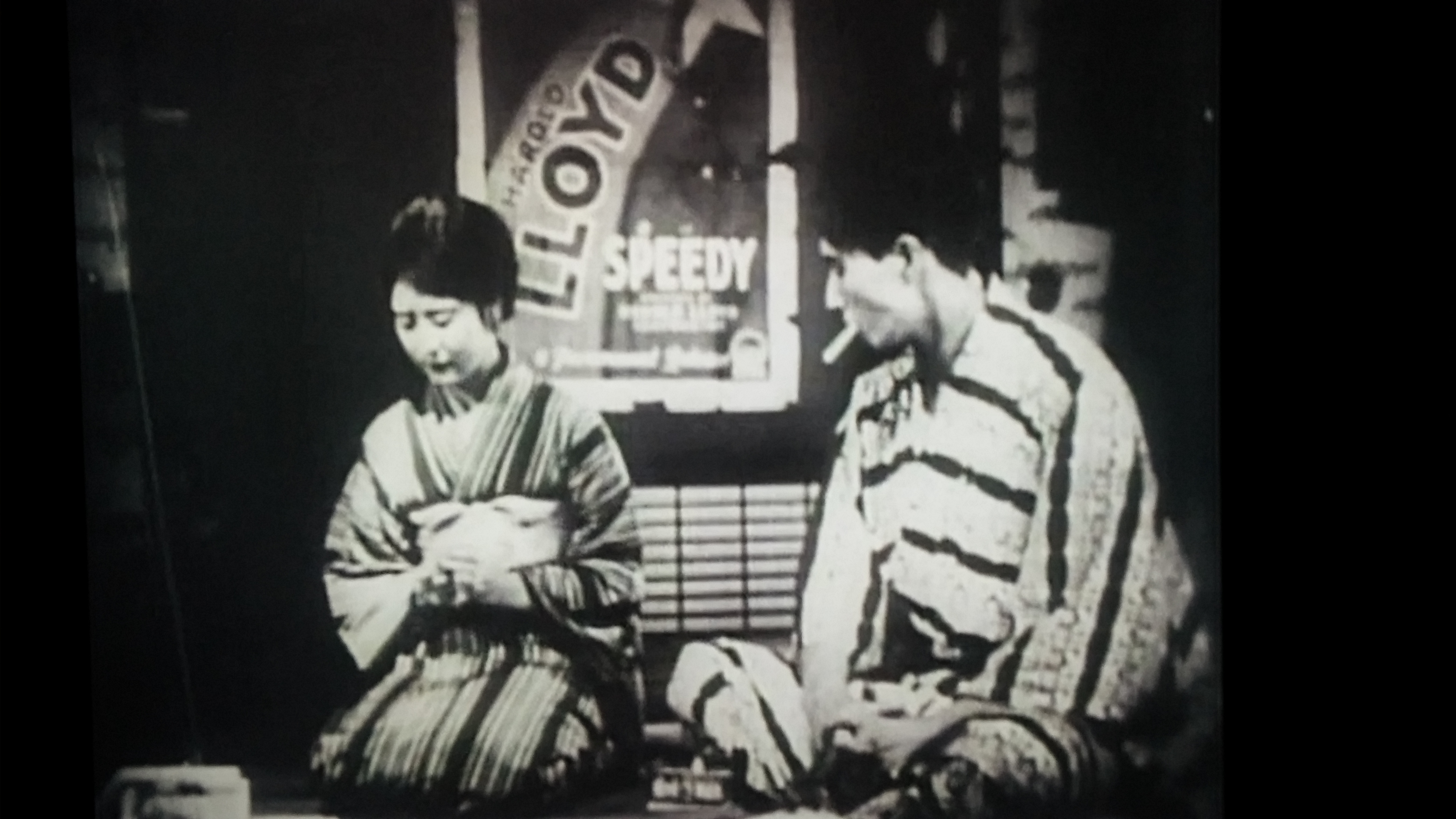 Fotograma de "Me he graduado pero..."